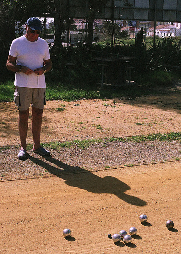 Pétanque Pétanque